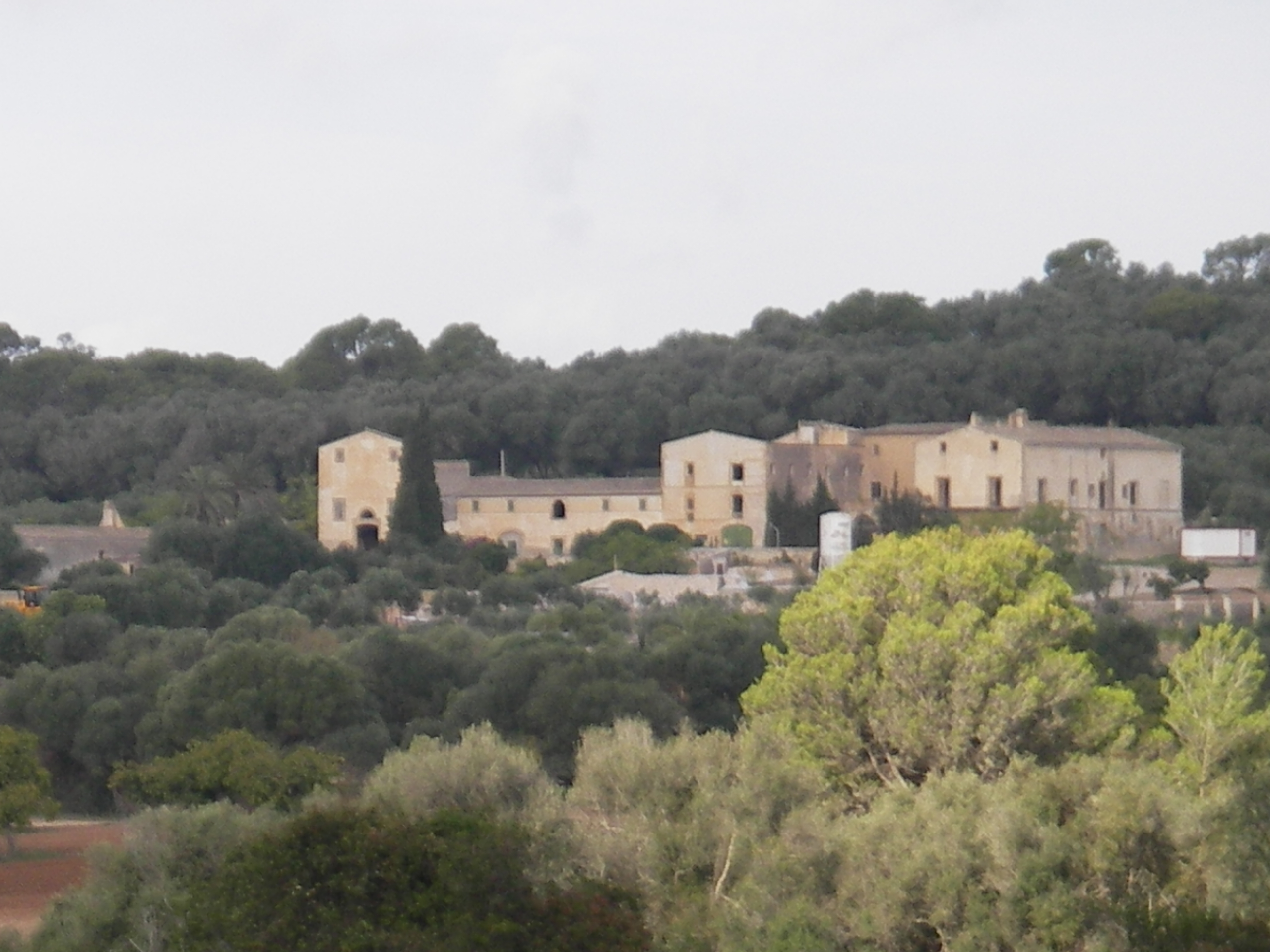 Cases des Fangar, Son Macià, Manacor, Mallorca. Feta el 2005 per Joan Miquel